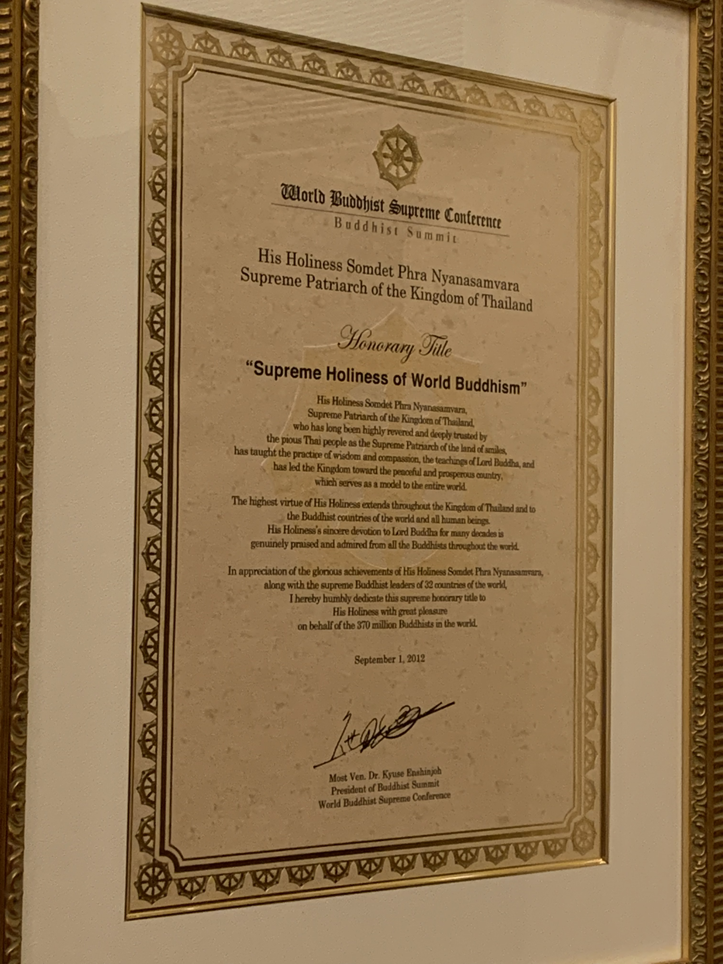 เอกสารยกย่องสมเด็จพระญาณสังวรฯ เป็นผู้นำพุทธศาสนาสูงสุดสากล จัดแสดงในพิพิธภัณฑ์วัดบวรนิเวศราชวรวิหาร